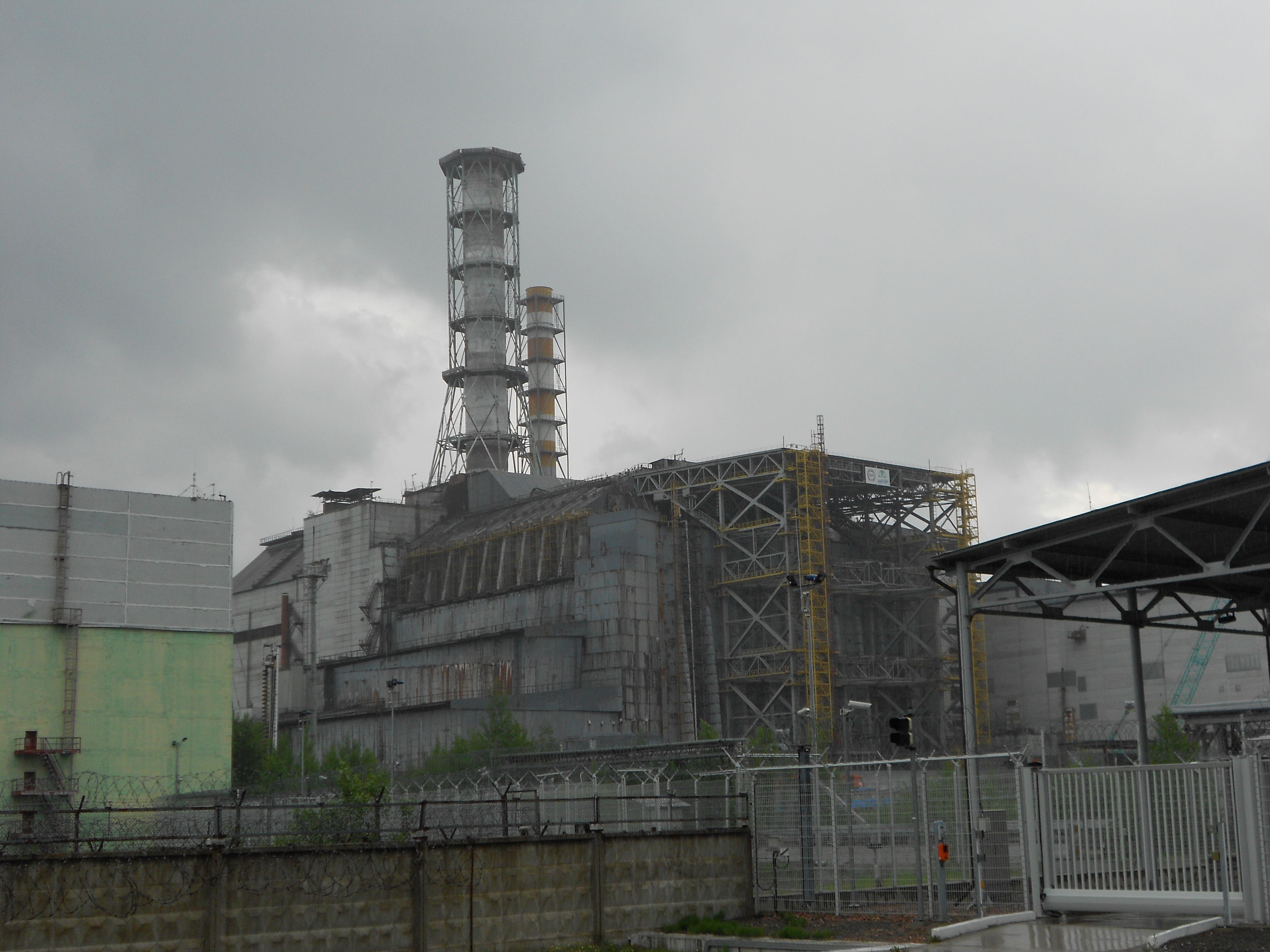 4-й эненгоблок Чернобыльской АЭС, 24 мая 2013